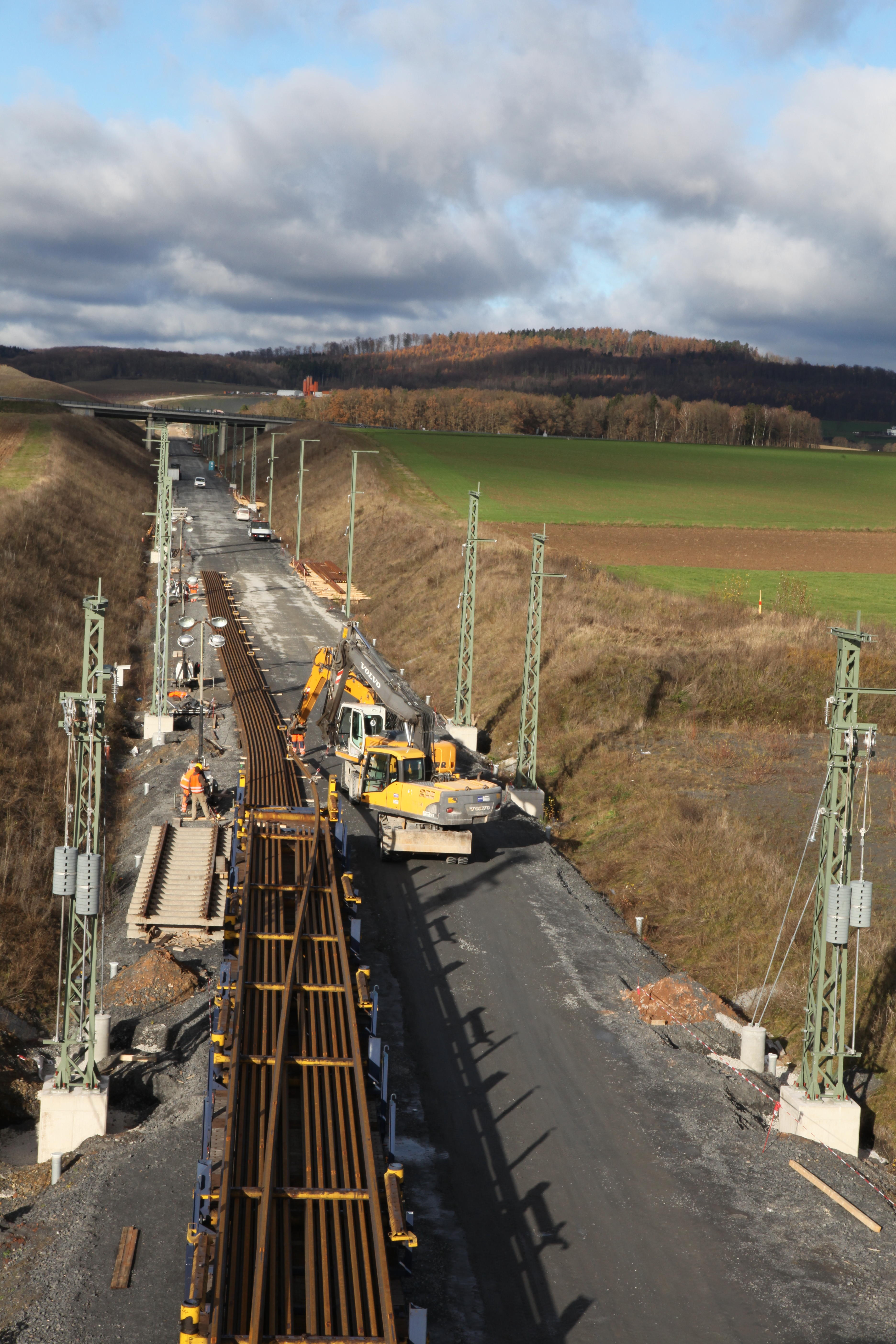 Schienentransportzug für die Neubaustrecke bei Dörfles Esbach